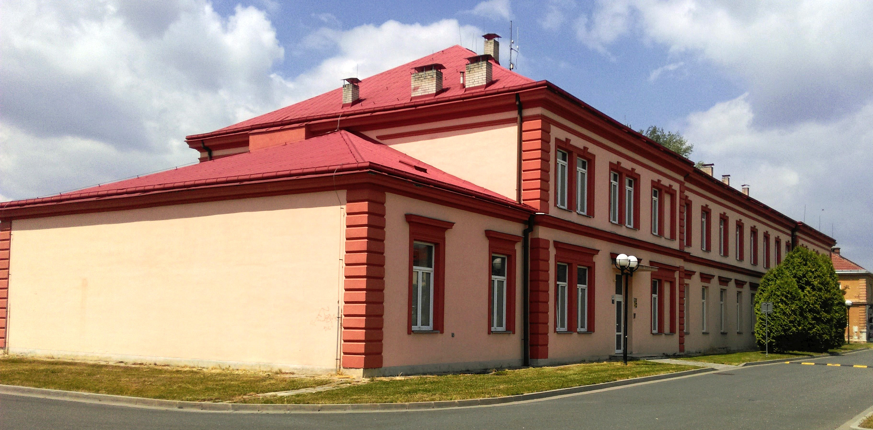 Budova depozitáře MUZEA KROMĚŘÍŽSKA, Hanácké náměstí č. p. 471/5